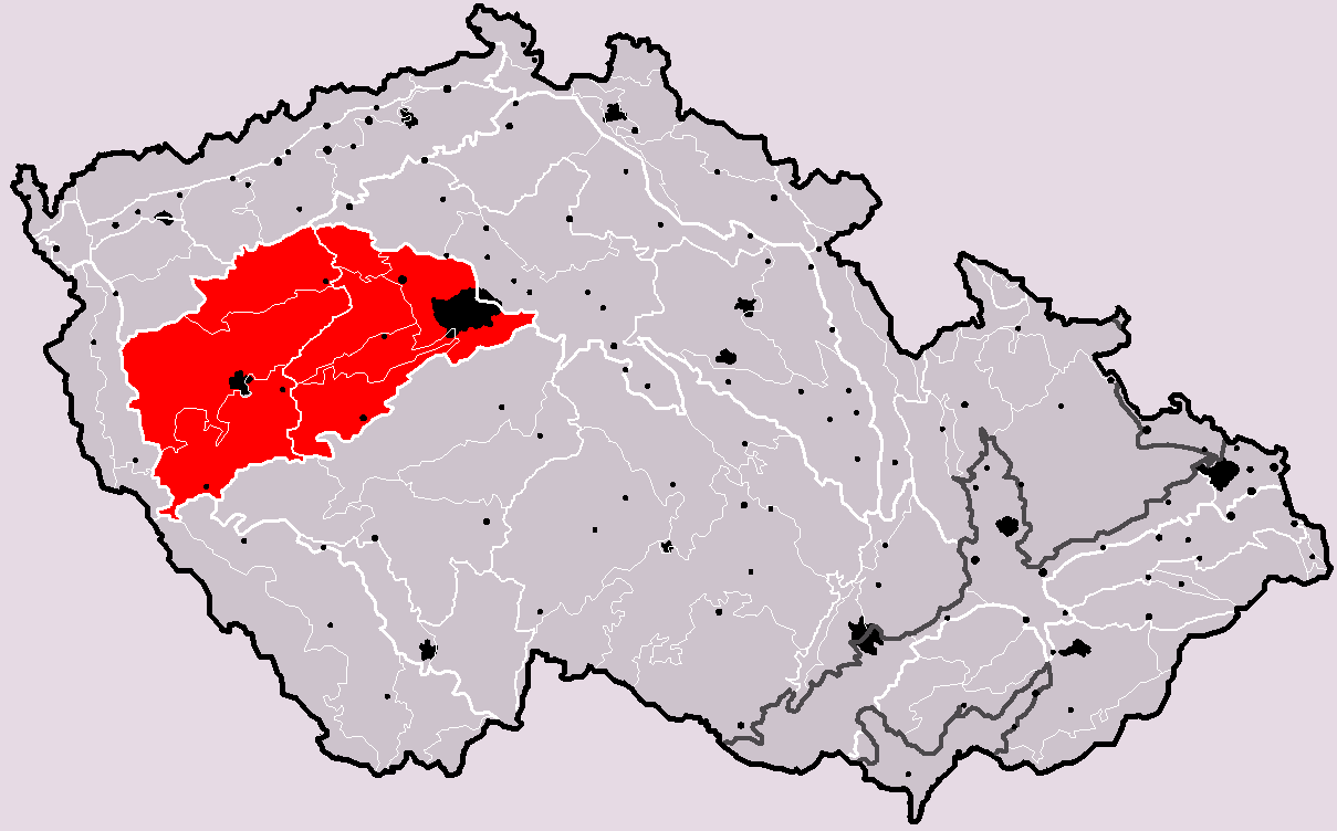 Poloha geomorfologické subprovincie (podsoustavy) (soustavy) Poberounská subprovincie v rámci České republiky. Hercynský systém Hercynská pohoří I Česká vysočina I5 (V) Poberounská subprovincie